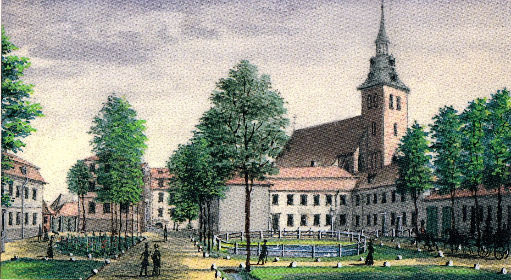 Ritterakademie und Abtei St. Michaelis in Lüneburg. 1841.